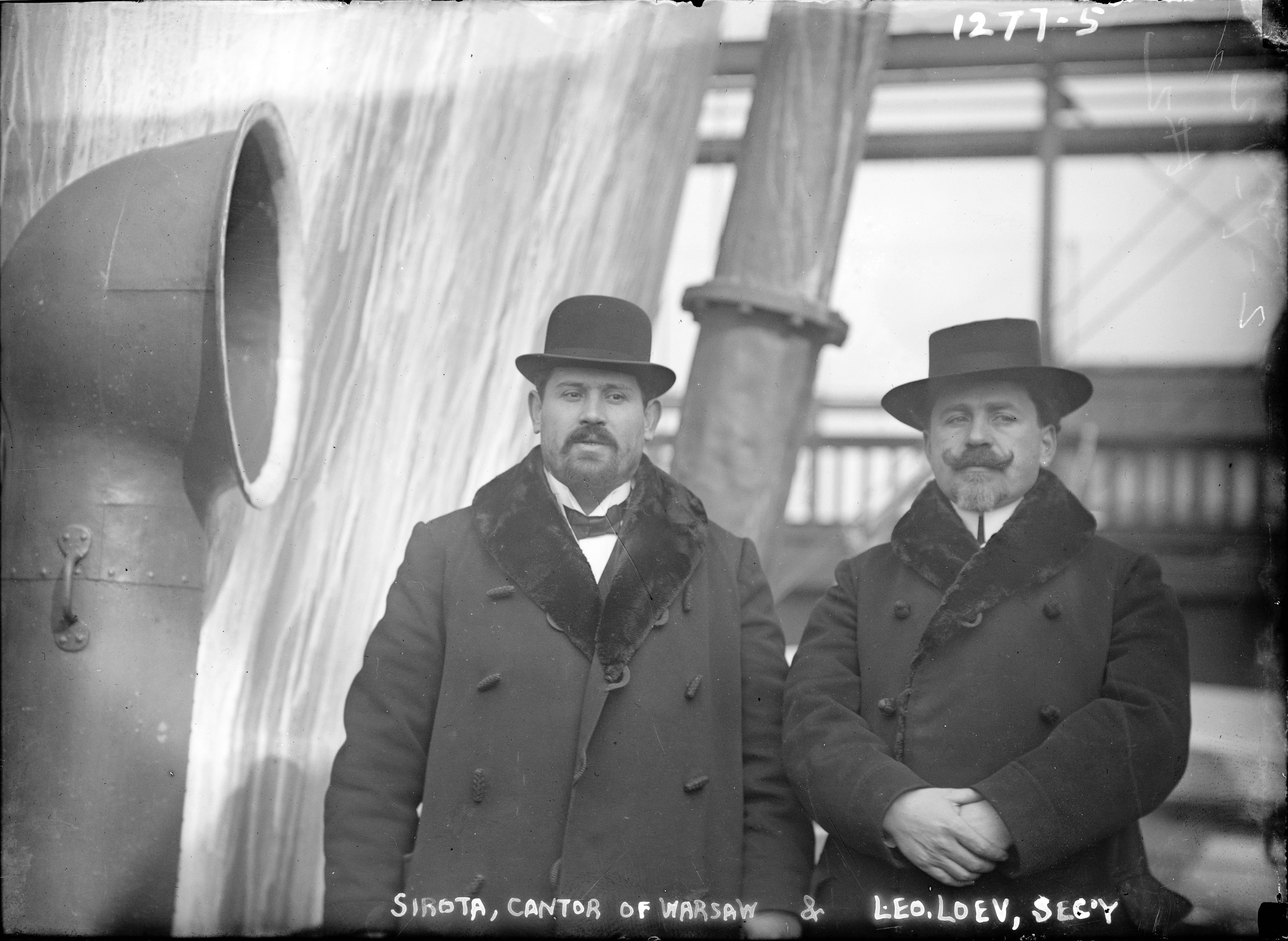 Гершон Сирота и Лео Лоев на гастролях в США